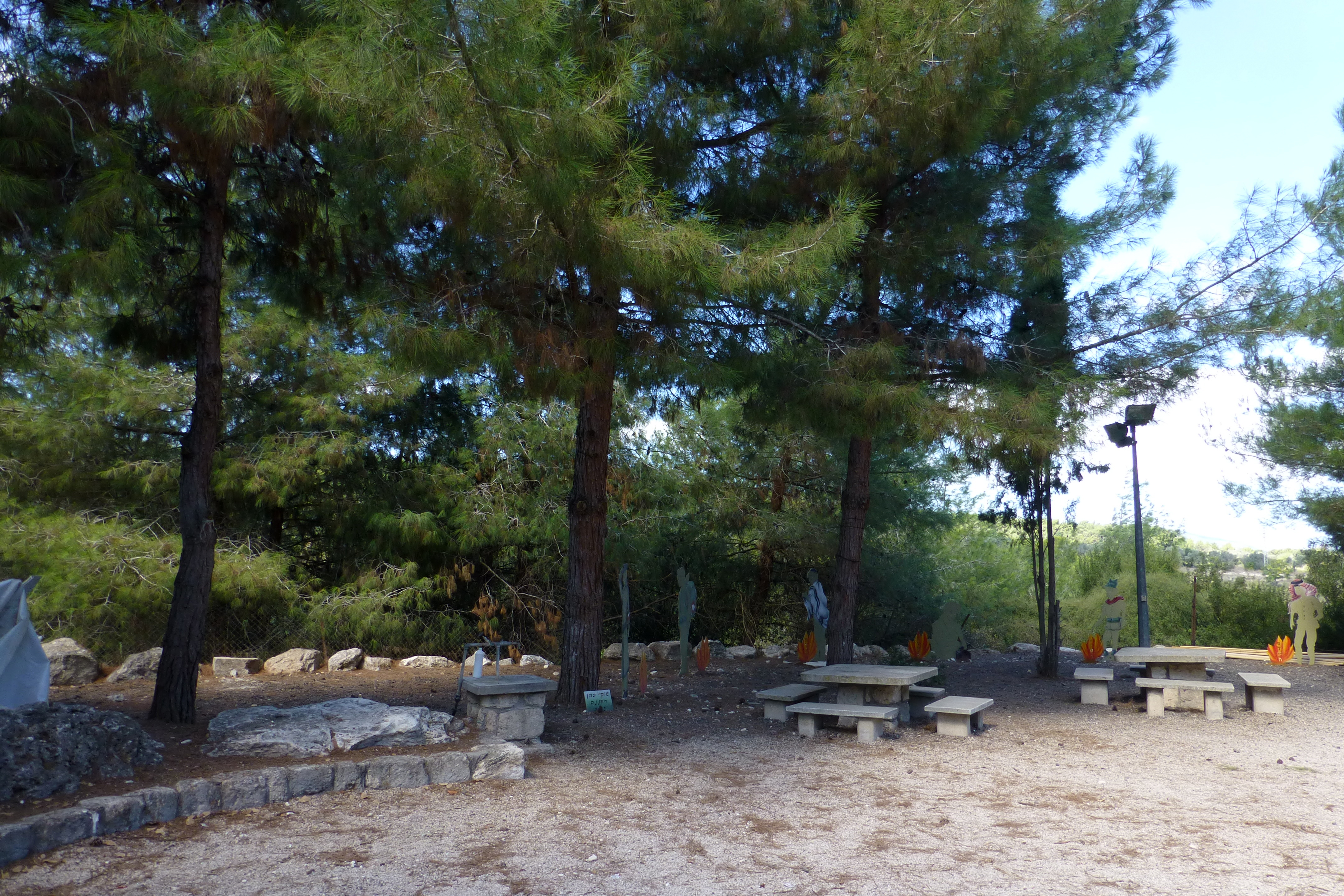 מערת הפלמ"ח במשמר העמק